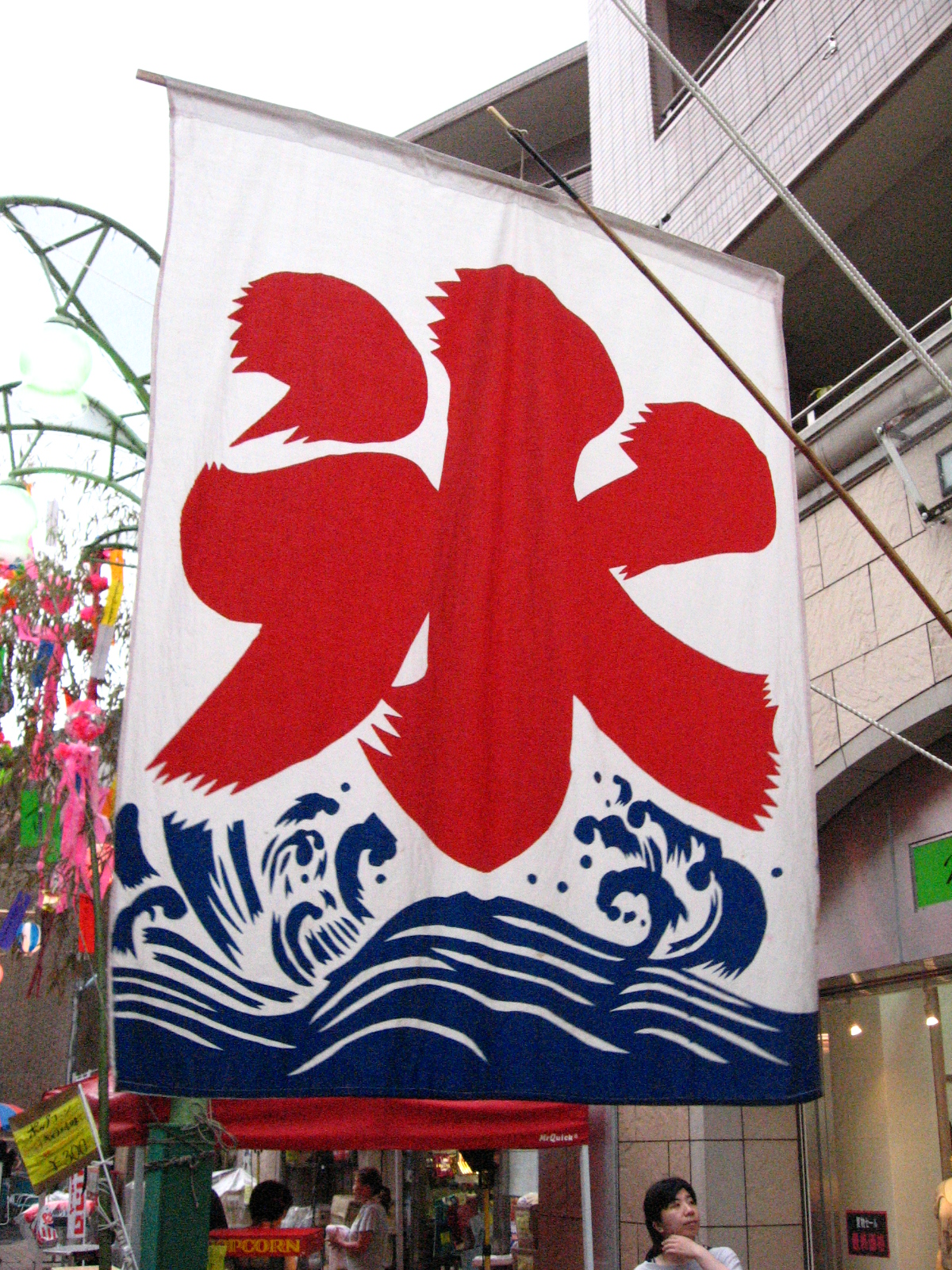 2009年8月9日、杉並区阿佐ヶ谷にて撮影